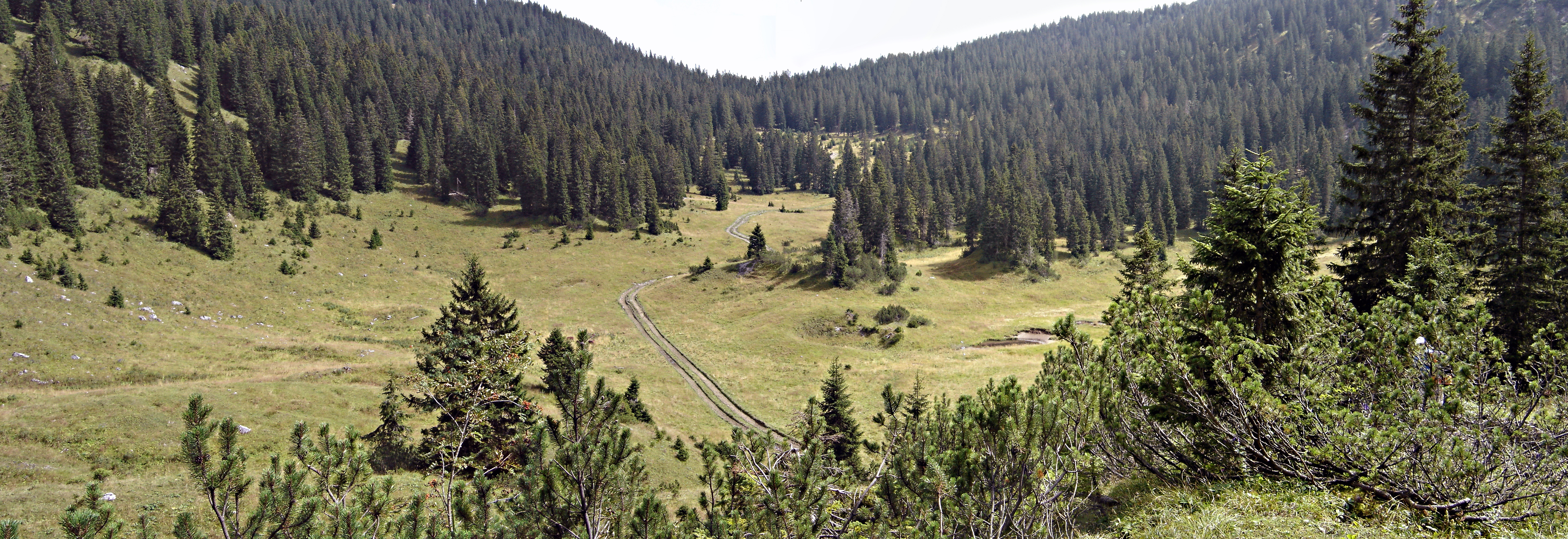 Doline Grünloch vom Sattel des Lechner Grabens aus gesehen